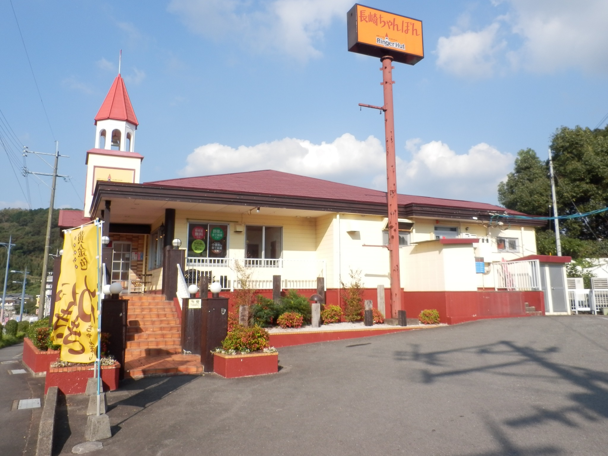 リンガーハット宿町店（リンガーハット1号店）